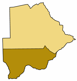 Mappa della diocesi di Gaborone, in Botswana. Lavoro personale, eseguito a partire da questa immagine di Commons. Fonte per i confini delle diocesi: Church Map in SACBC Guida delle missioni cattoliche 2005, a cura della Congregatio pro gentium evangelizatione, Roma, Urbaniana University Press, 2005 Categoria:Chiesa cattolica in Botswana